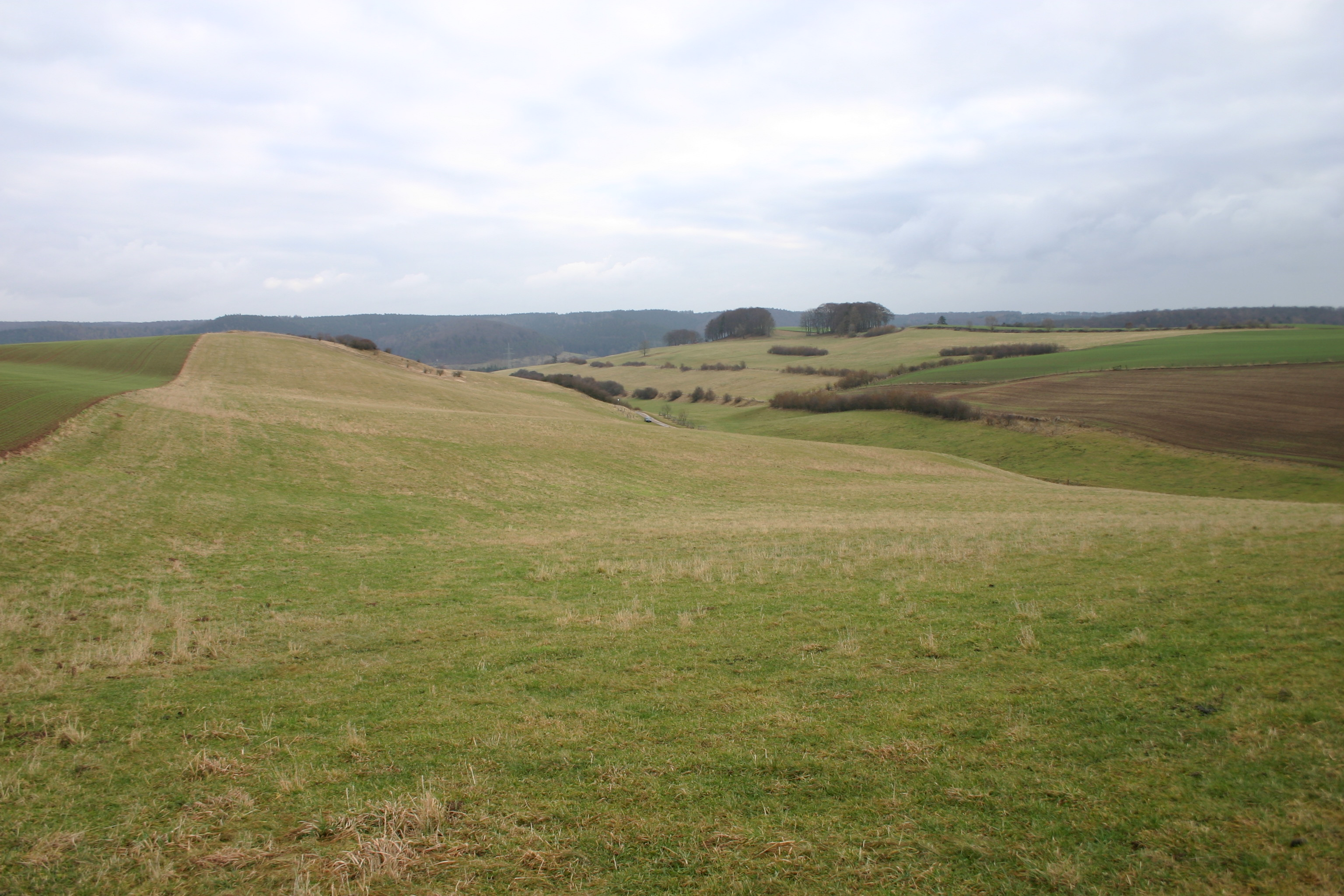 LSG Magergrünland am Glockengrund im Vordergrund und NSG Glockengrund rechts hinten. Blick von Westen auf nördliche Teilfläche.